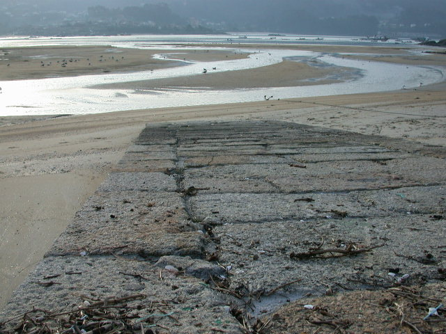 Praia de San Cibran, Aldán